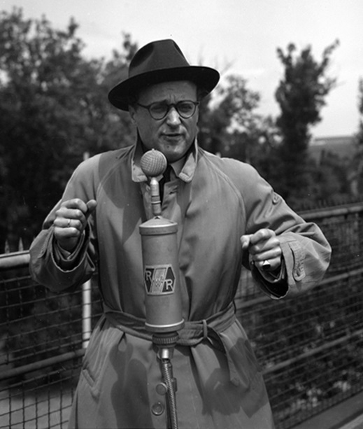 Bildnisse (:Kniestück stehend; mit Brille, Hut und Mantel) vor Mikrophon des Radiosenders Rot-Weiß-Rot als Kommentator einer Sportveranstaltung.